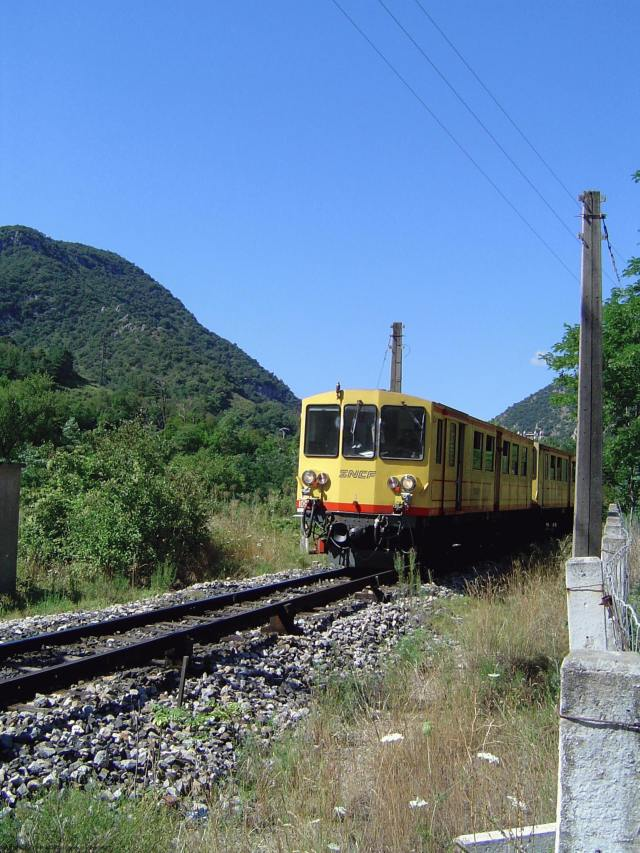 Train Jaune (Z100) arrivant en gare de Villefranche de Conflent 2005. Cevenol2